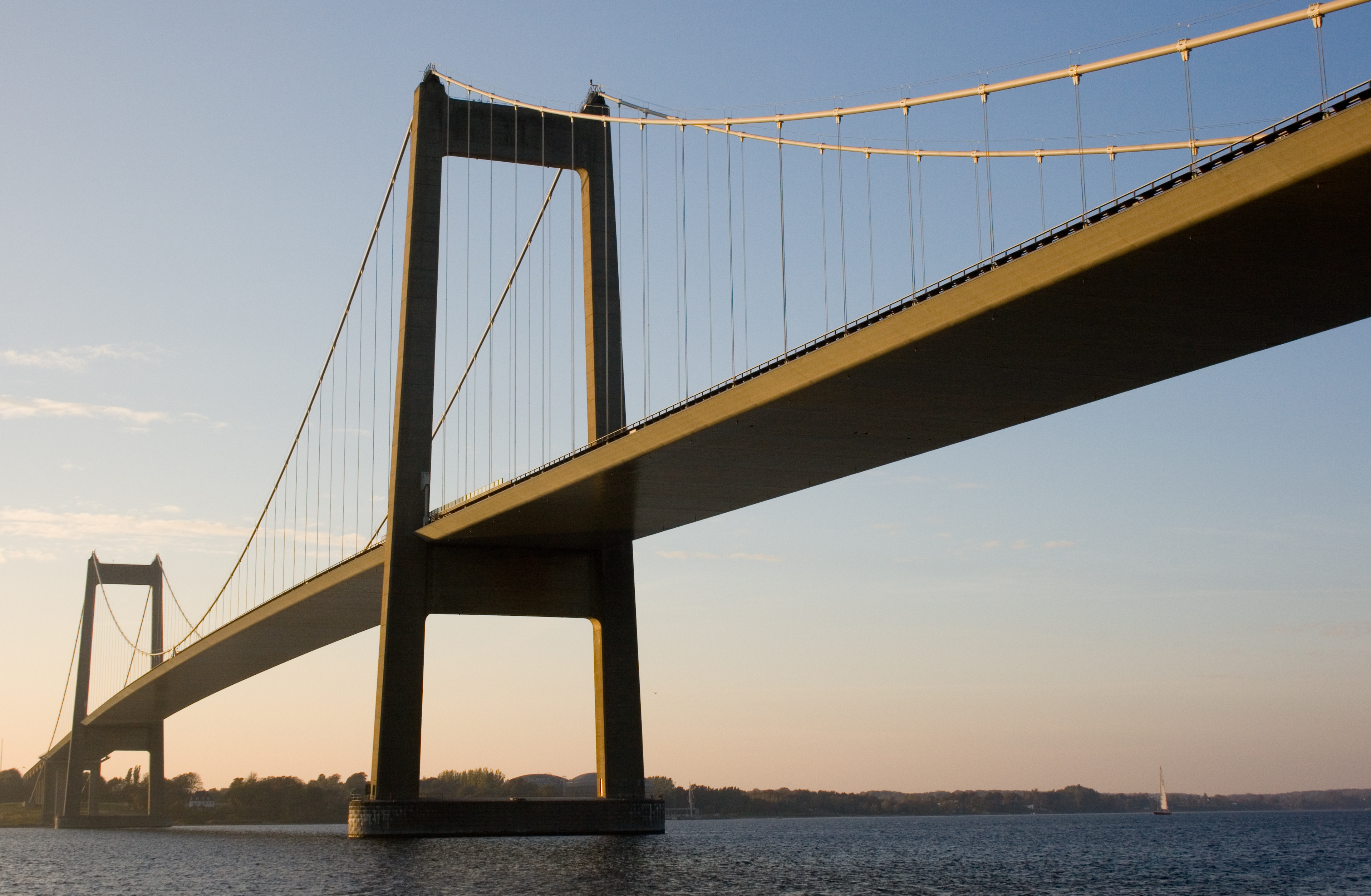 Lillebælt, Denmark, Lillebæltsbroen